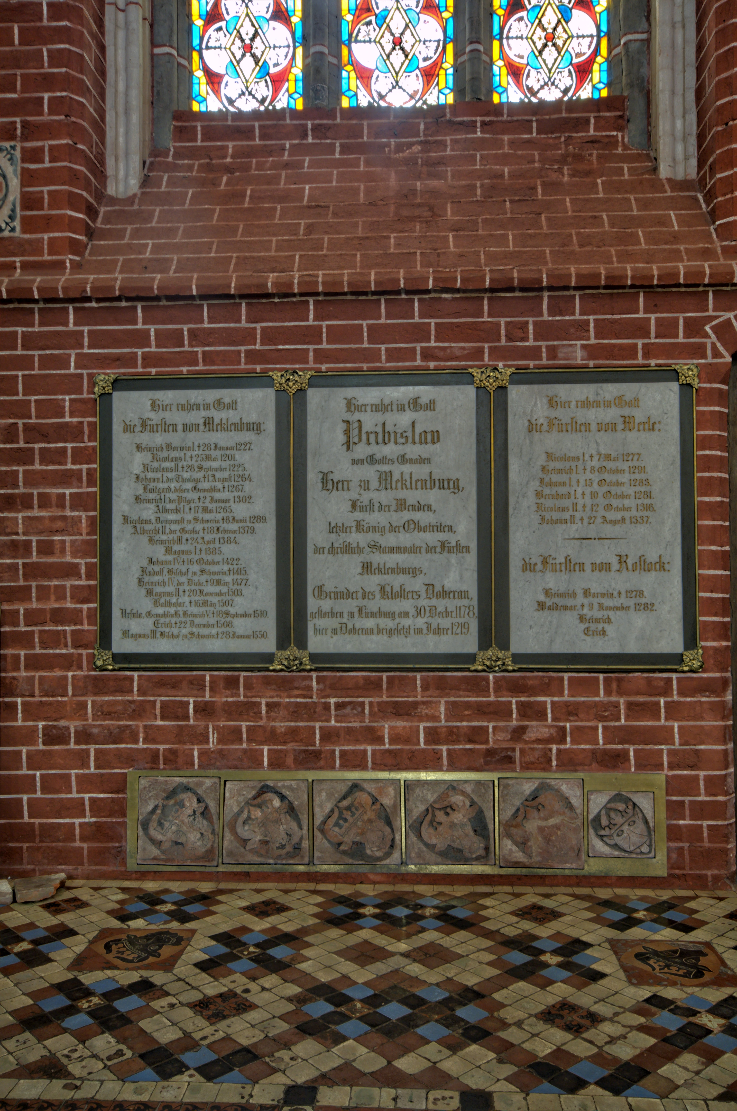 Münster Bad Doberan